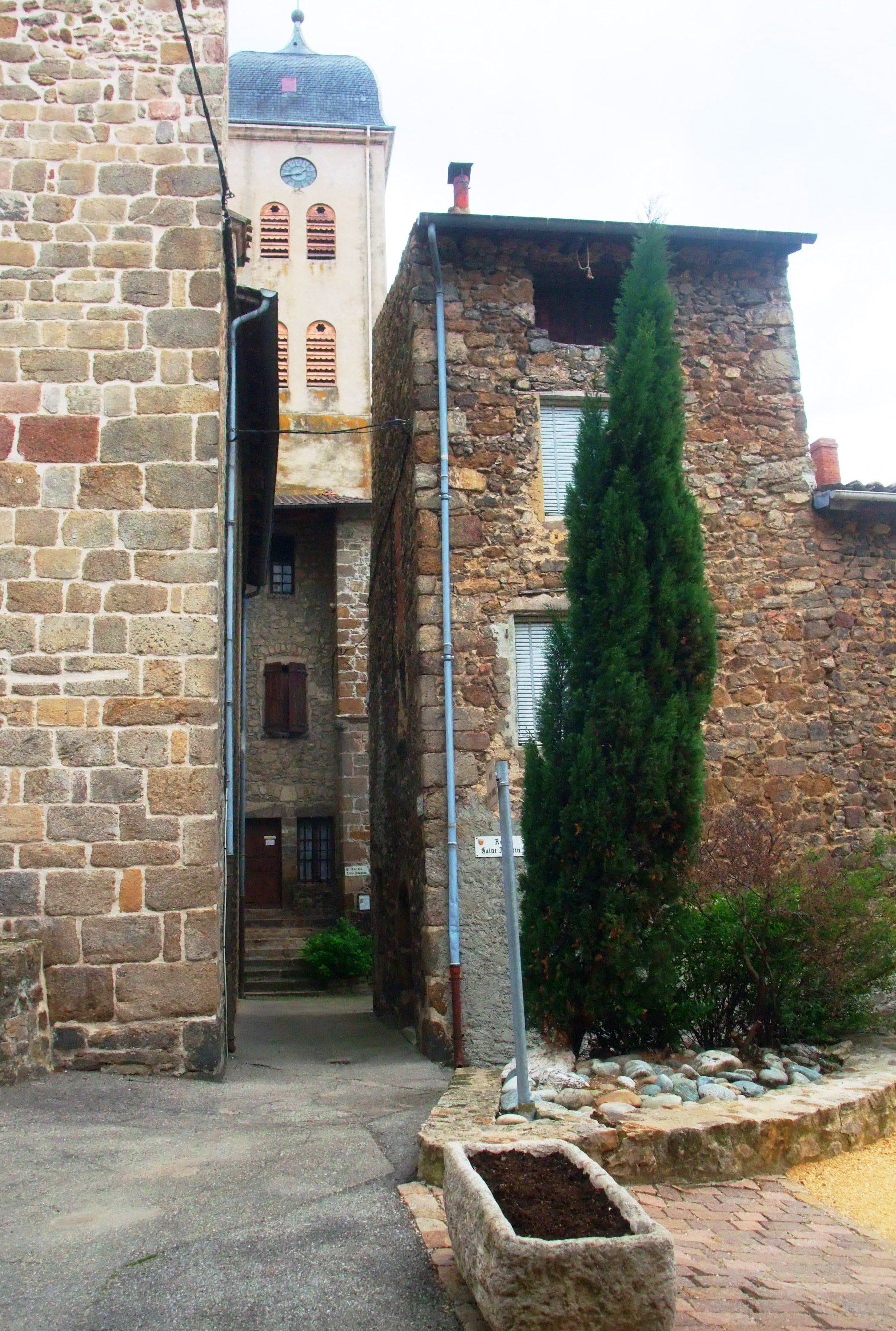 Boulieu impasse du cimetière